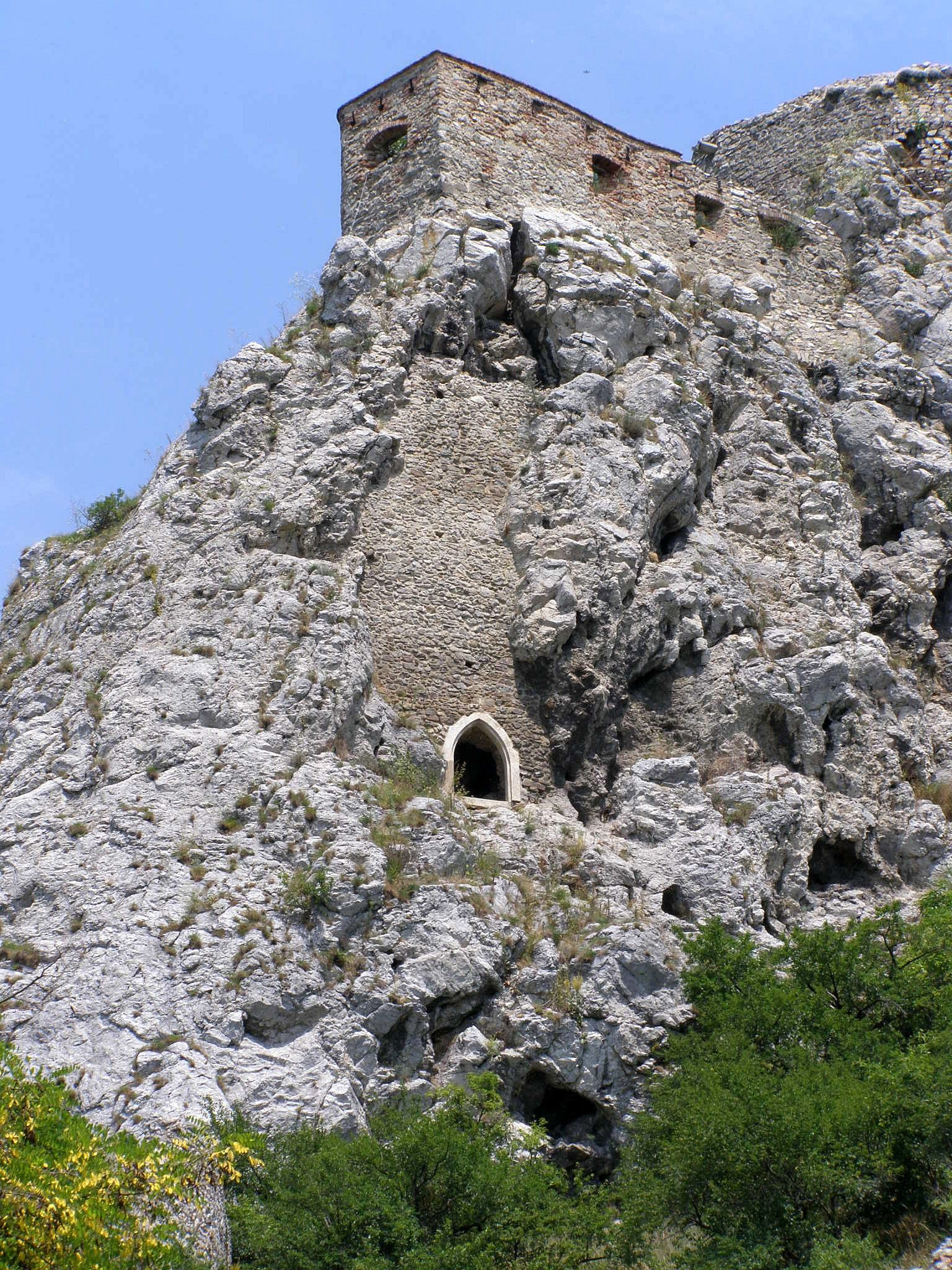 Južné bralo Devínskeho hradu. V dolnej časti gotický portál zabezpečujúci vstup do tzv. tunelovej jaskyne